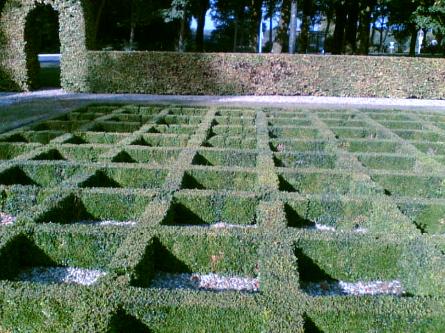 Razziamomument Putten herdenkingshof